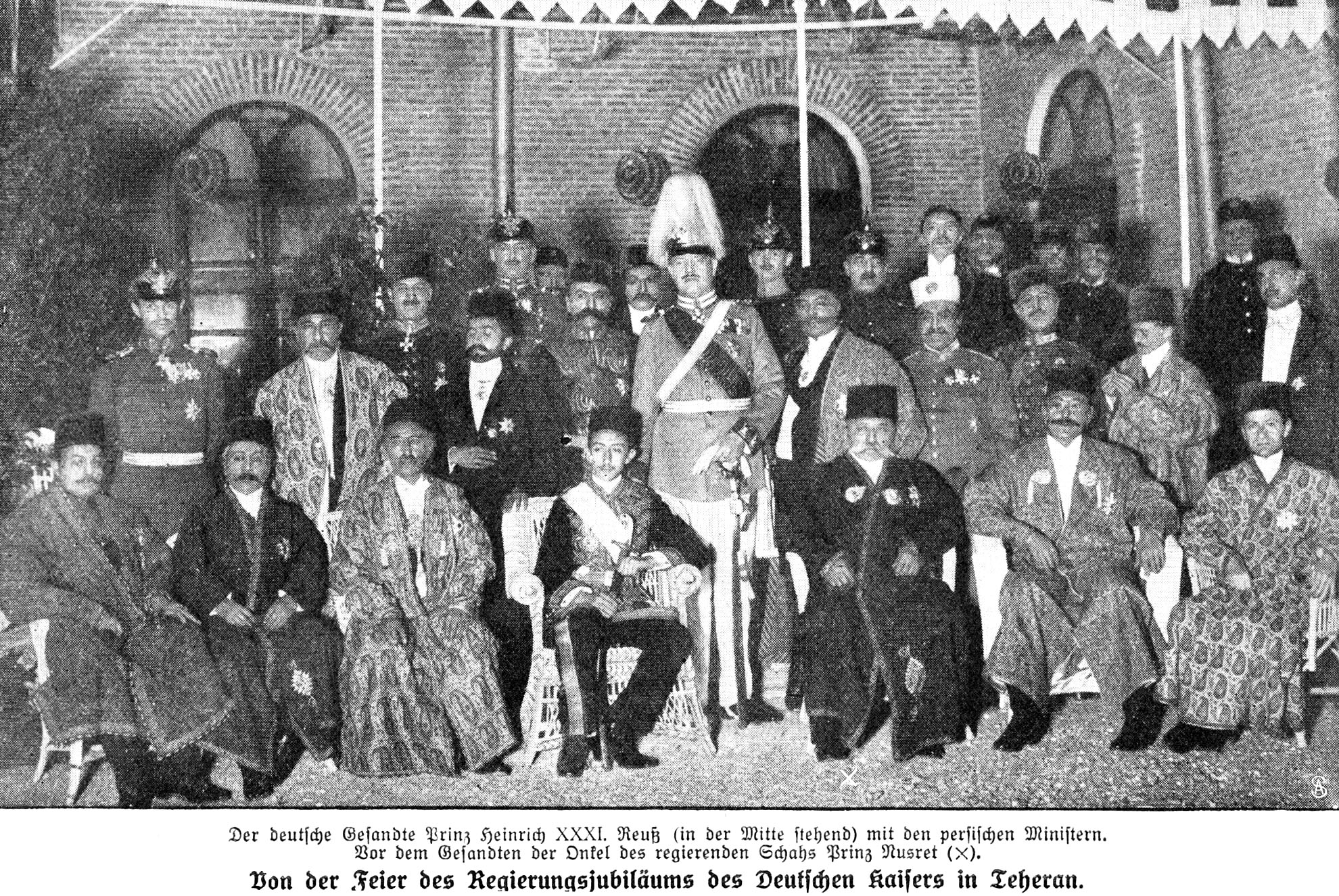 Feier des Regierungsjubiläums des Deutschen Kaisers in Teheran mit dem deutschen Botschafter in Teheran, Prinz Reuss XXXI.